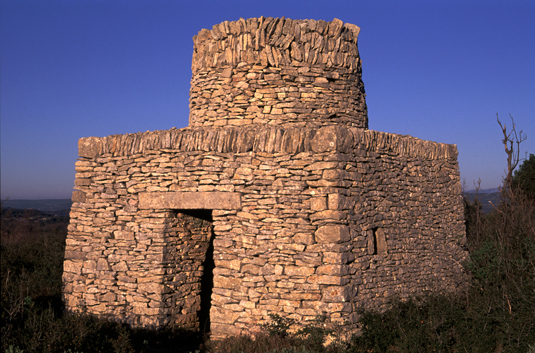 Cabane en pierre sèche dite " de Malais " à Souvignargues (30250) près de Sommières dans le Gard. Photo de Dominique Repérant.